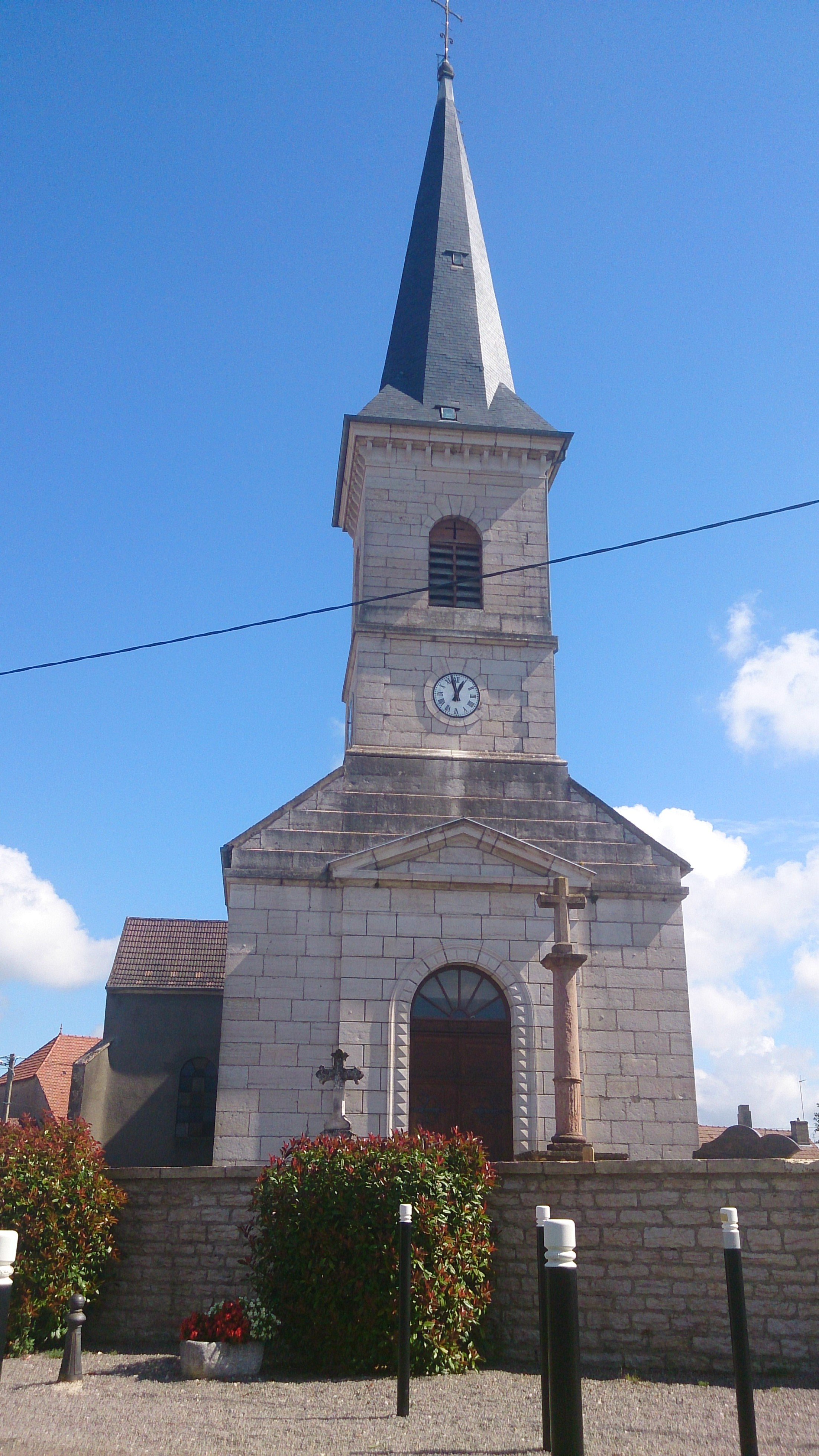 Labergement-Les-Auxonne, l'église